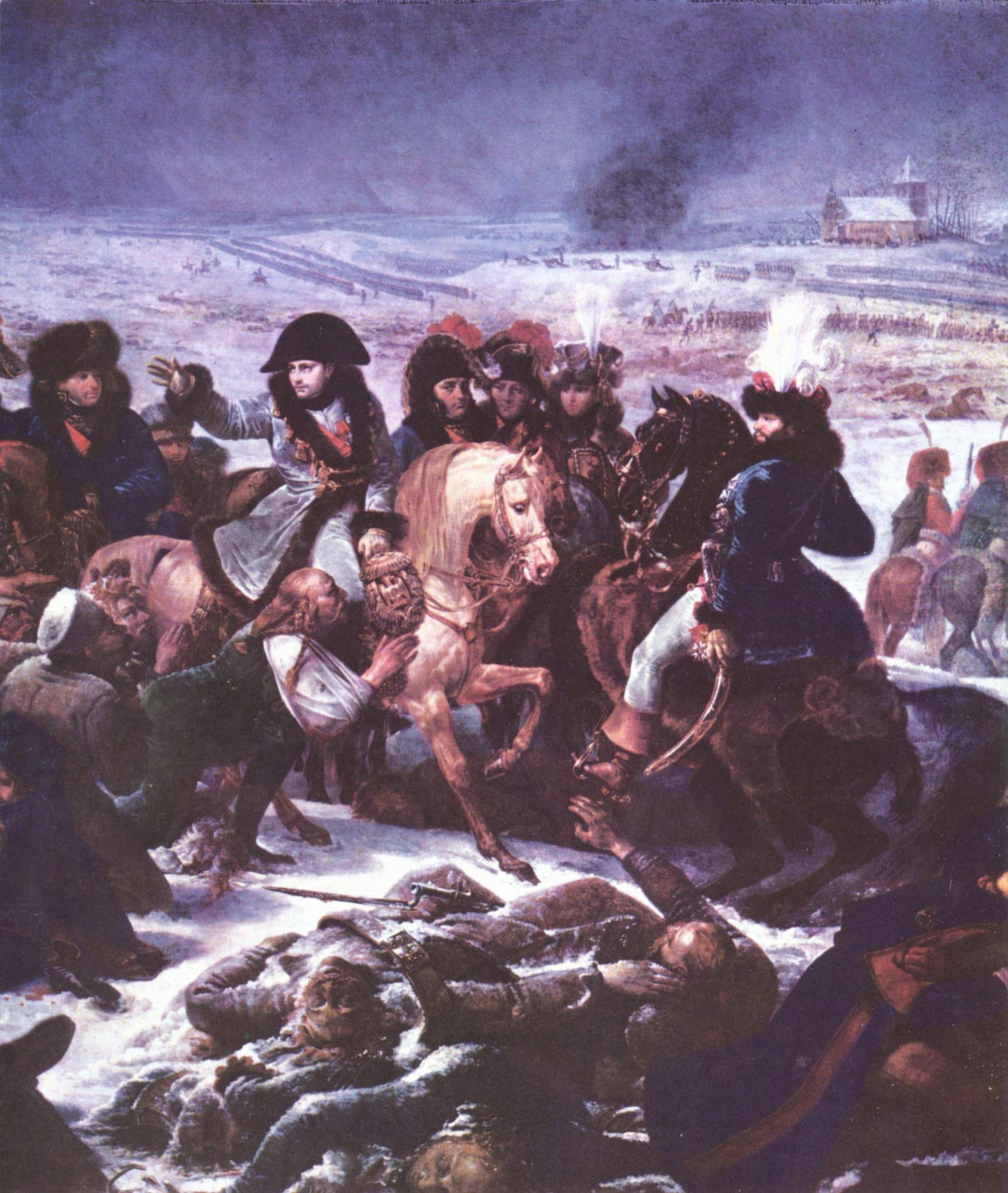 detail